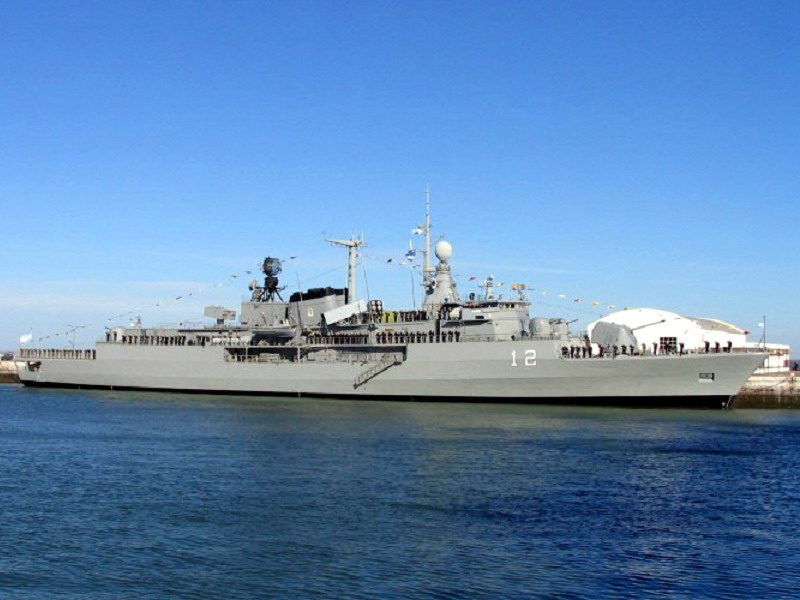 Meko 360H2 (D-12) ARA "Heroina"